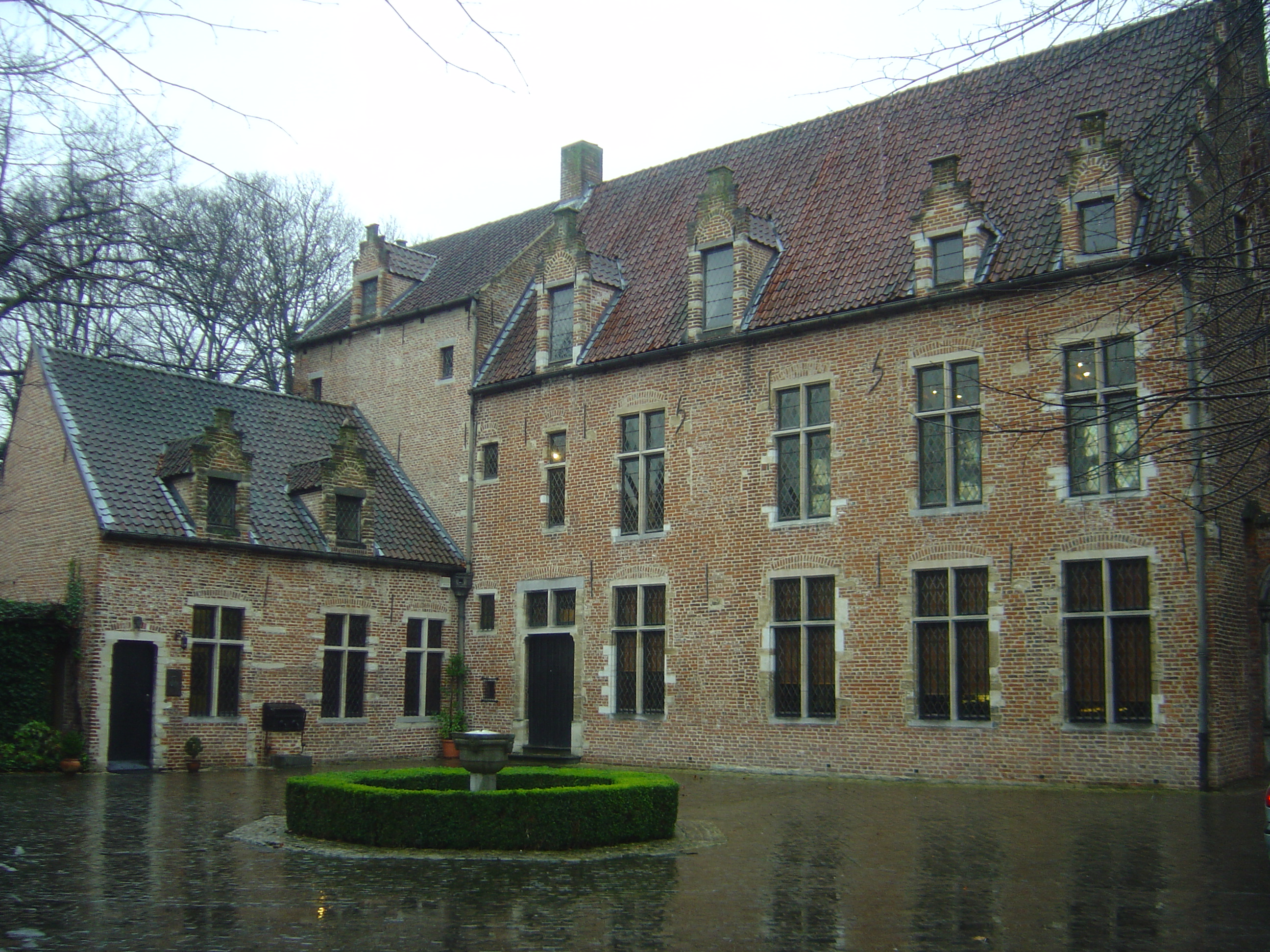 Η Οικία-Μουσείο του 'Ερασμου, 'Αντερλεχτ-Βρυξέλλες